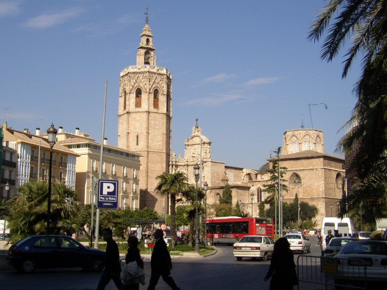 Valencia (Comunidad Valenciana), España. Valencia. Catedral y torre del Miguelete. Fotografía realizada el 11 febrero de 2003 por el autor Usuario. Pelayo2.